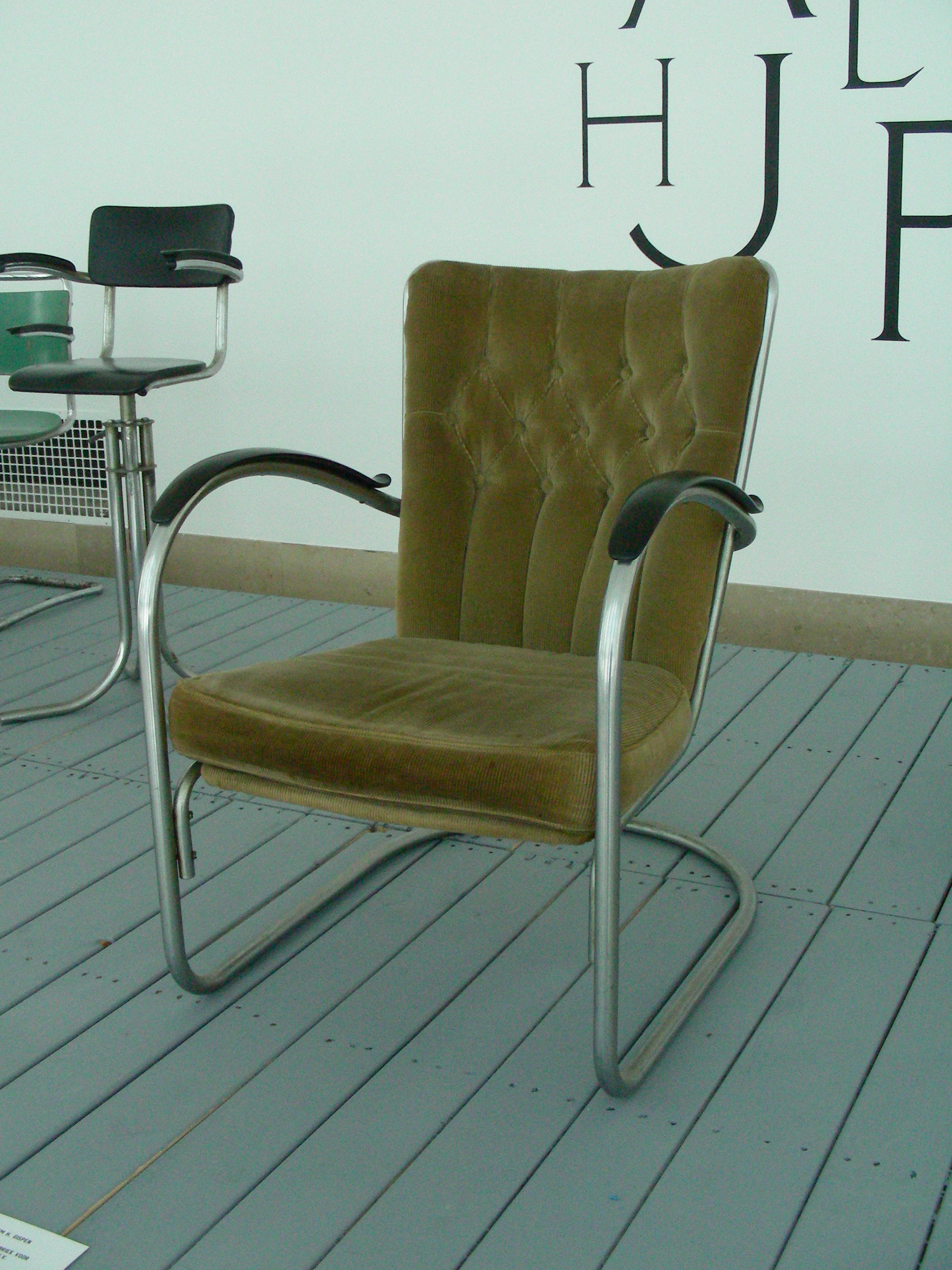 Fauteuil Gispen, model nr.412 (1934). Vernikkeld stalen buis, bakeliet, ribfluweel.